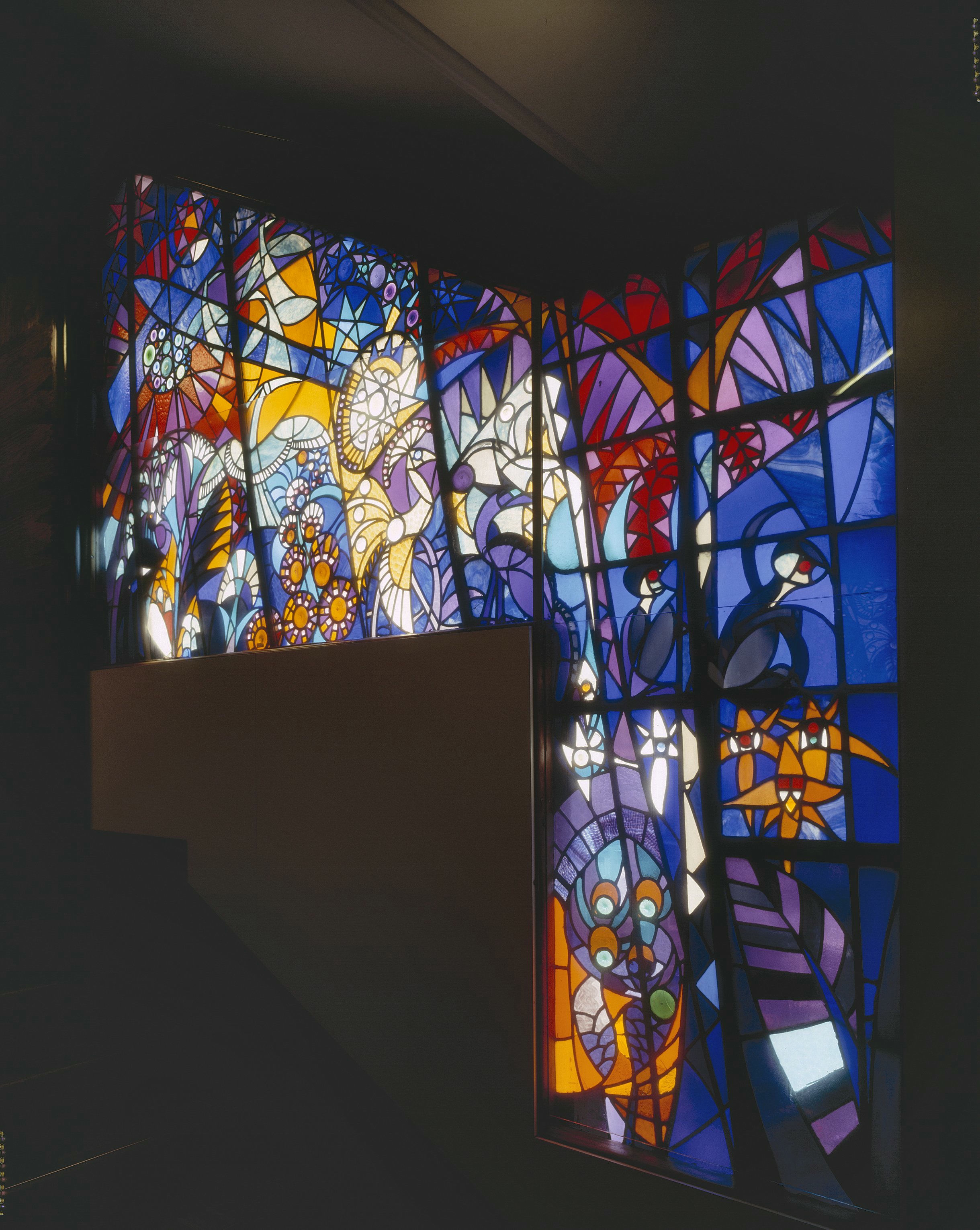 Warenhuis De Bijenkorf: Interieur trappenhuis, aanzicht glas-in-loodraam (opmerking: Gefotografeerd voor Glas in lood in Nederland 1817-1968)